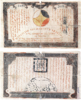 10 Монгольских долларов барона Унгерна